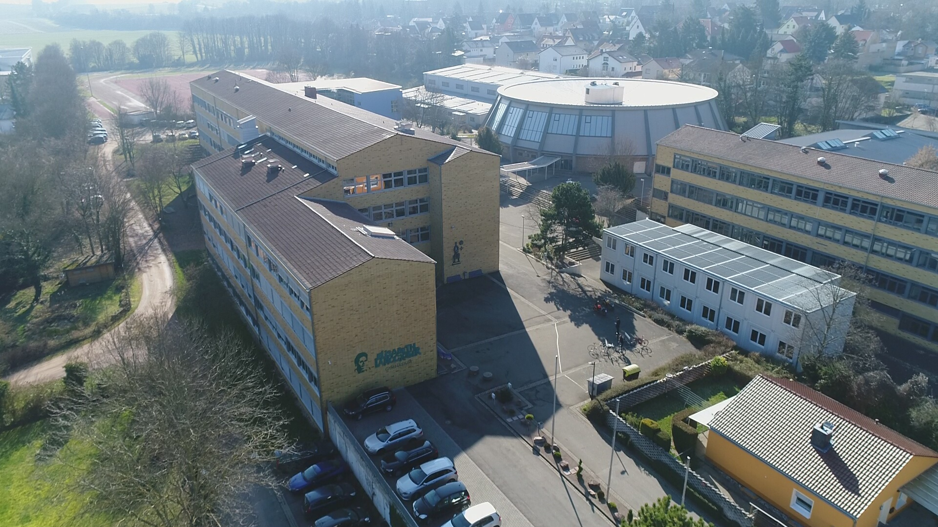 Das Elisabeth-Langgässer-Gymnasium von oben.